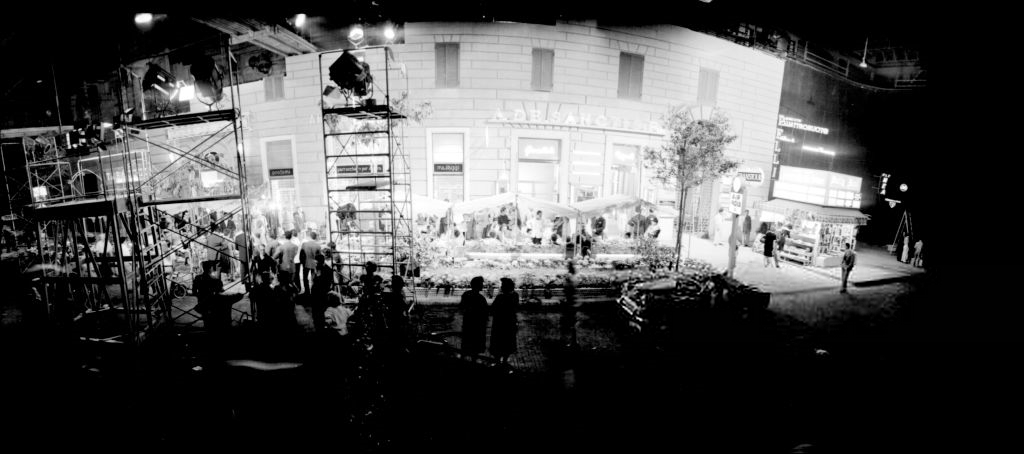 La via Veneto de Rome reconstruite dans les studios Cinecittà, pour le tournage de La dolce vita, en 1959